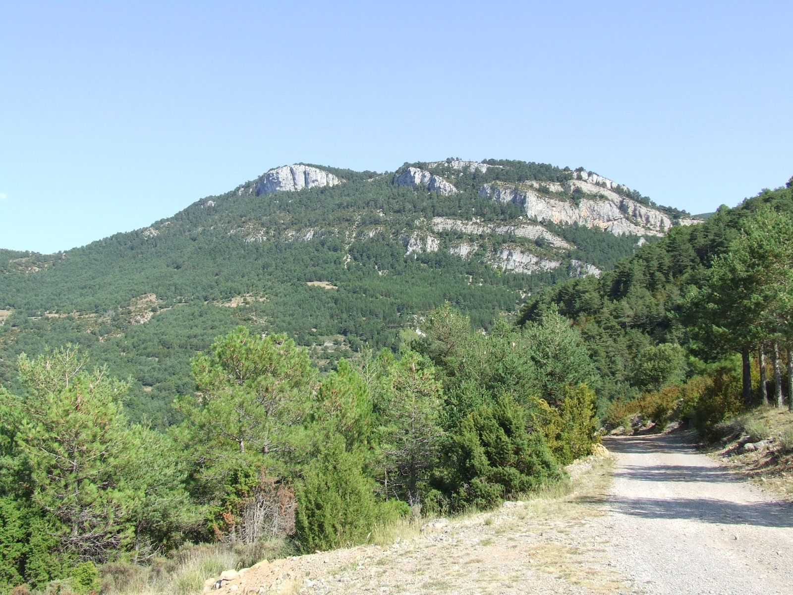 Roc de Penalta i Rocs del Comeller (Hortoneda de la Conca, Conca de Dalt, Pallars Jussà)